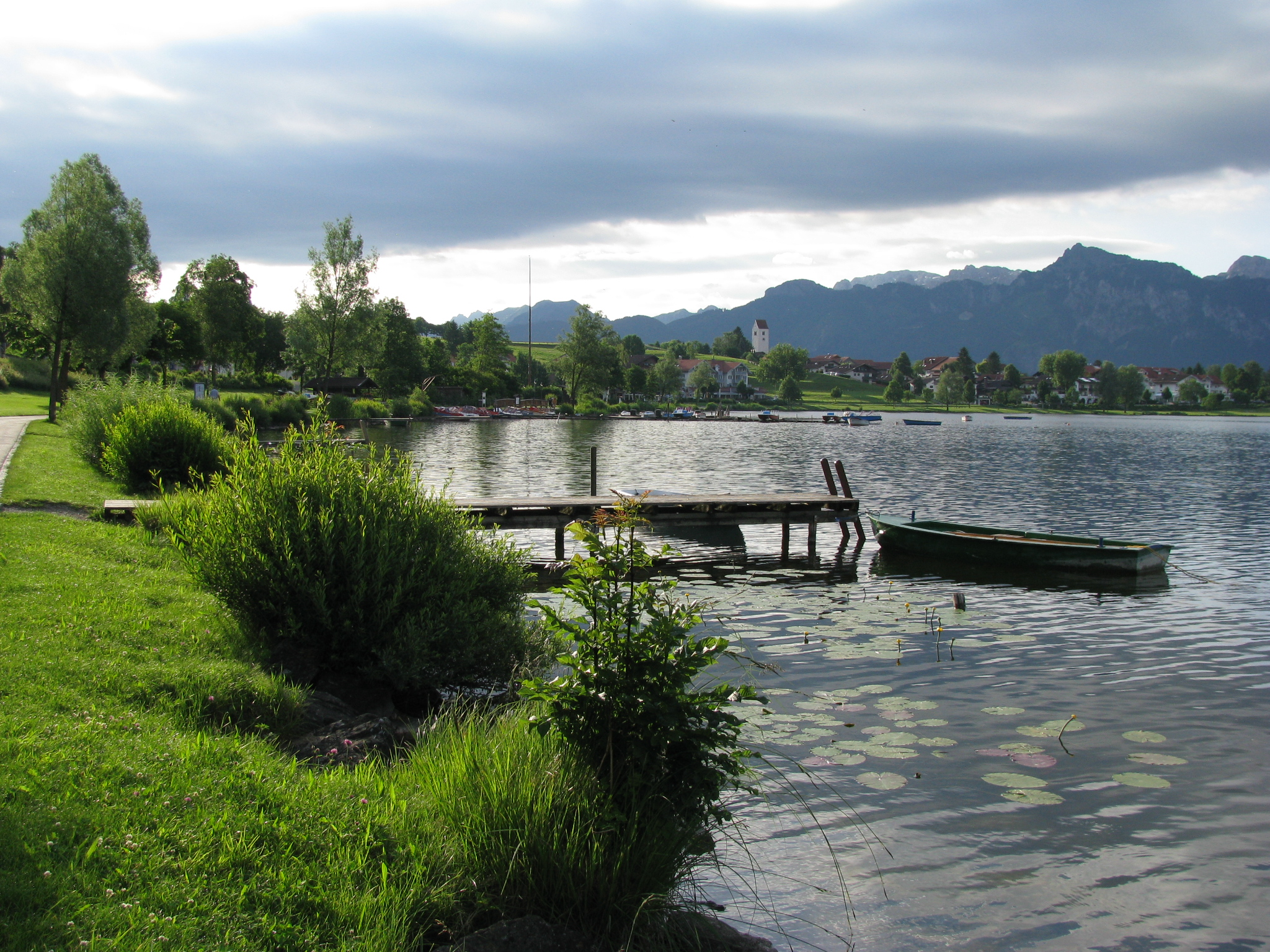 Hopfen am See